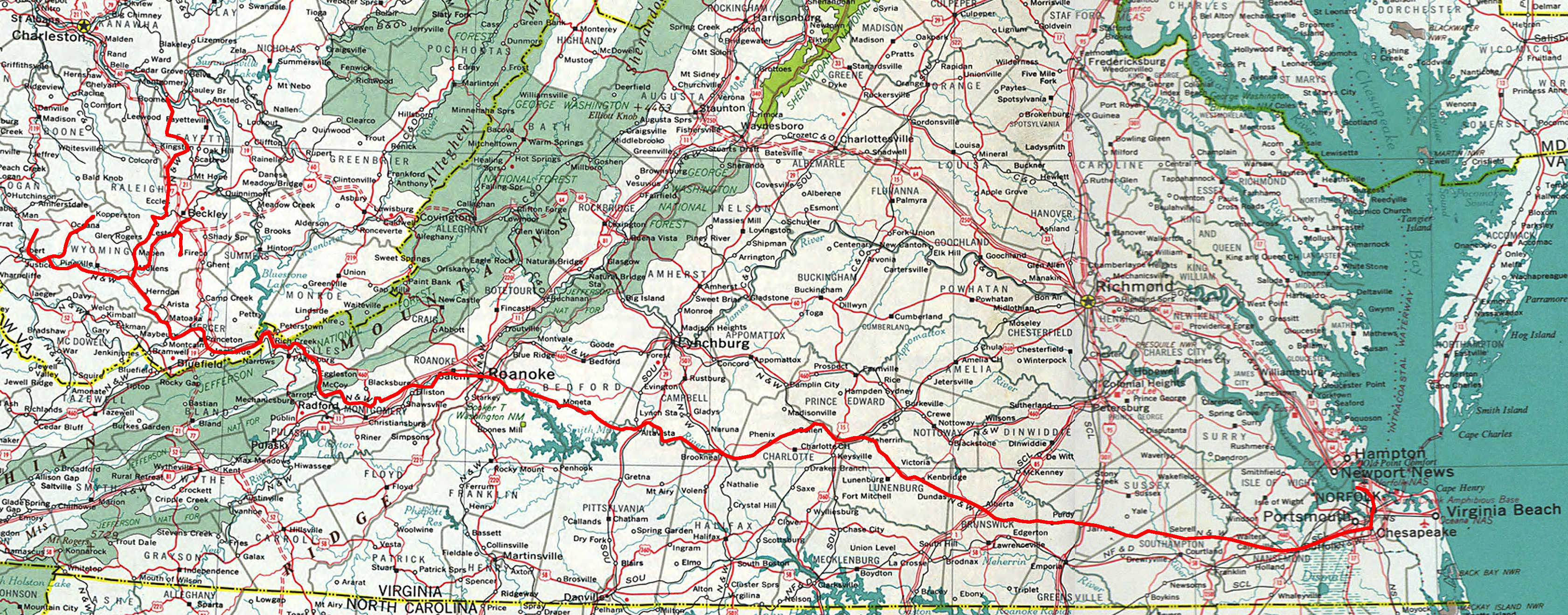 Karte der Virginian Railway